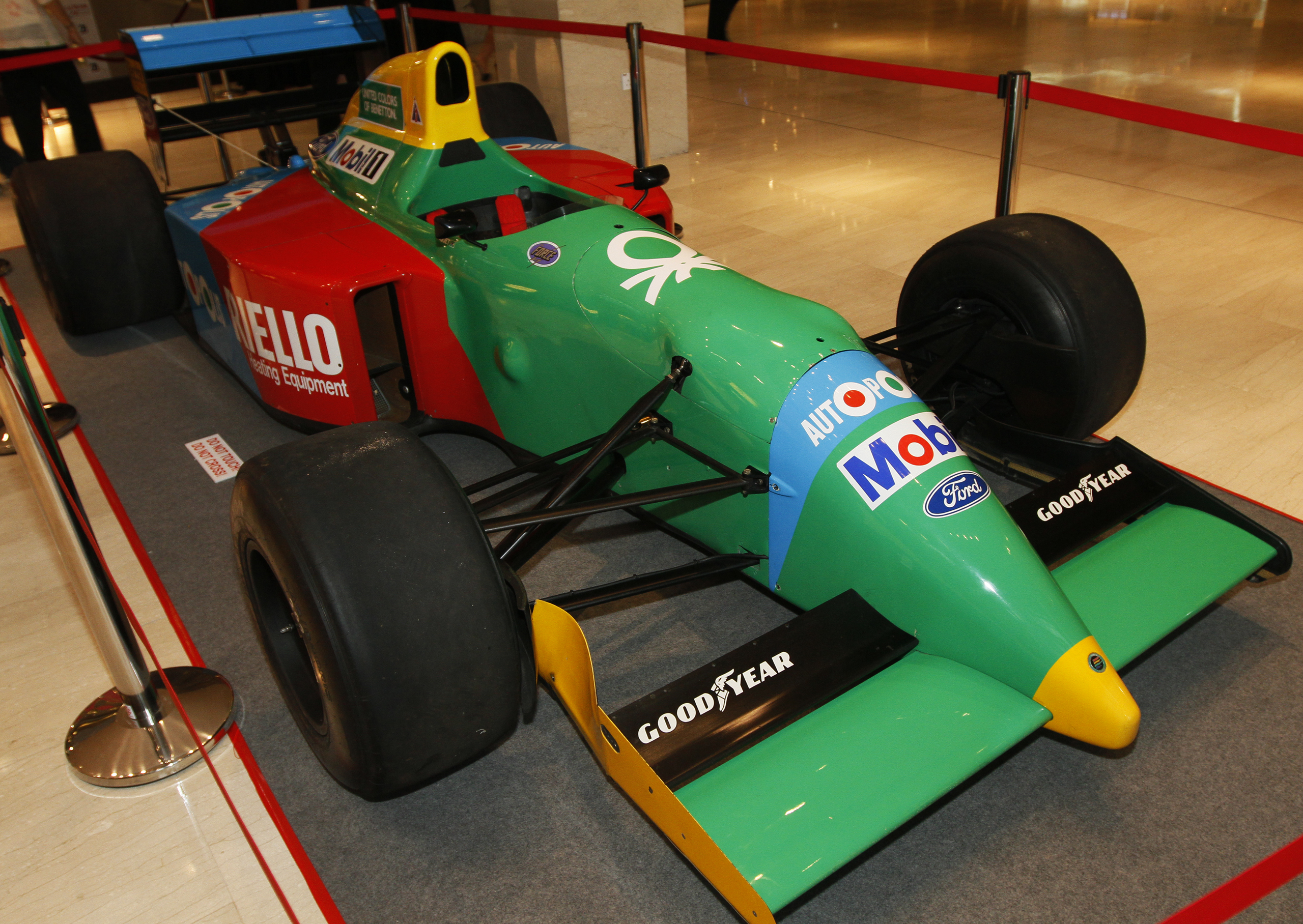 Pavilion Pit Stop 2010: Benetton B190 (Nelson Piquet's car)